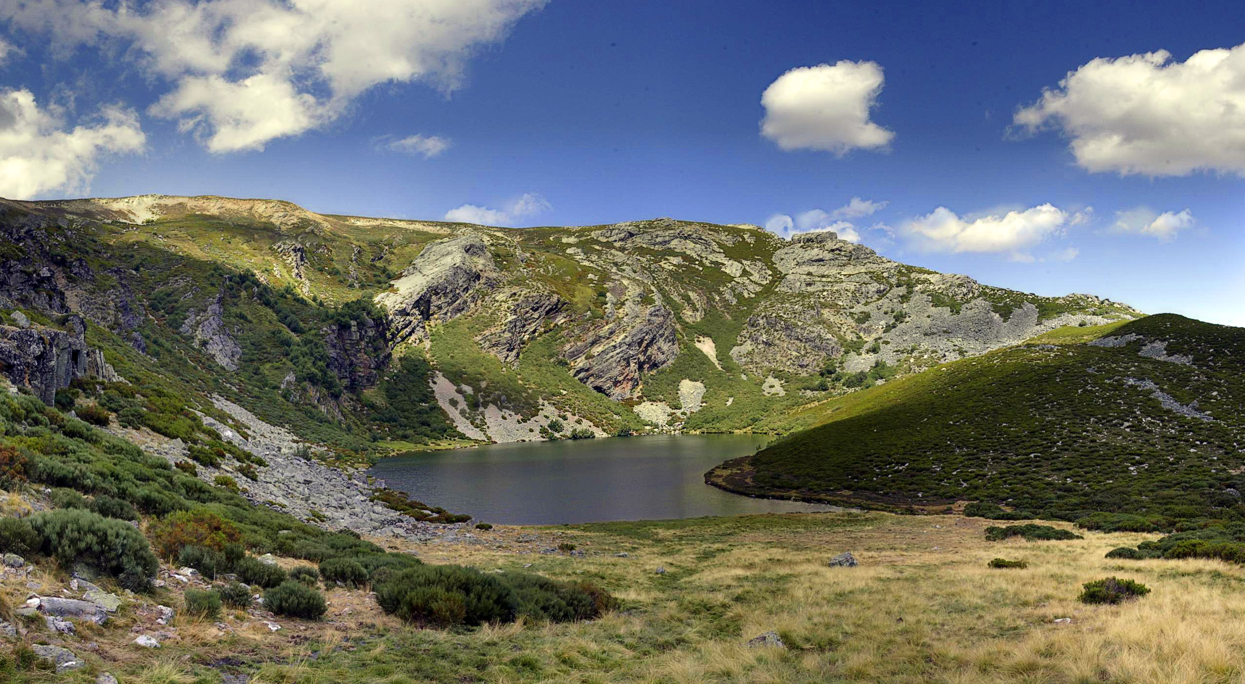 Lago en Truchillas, León, España.